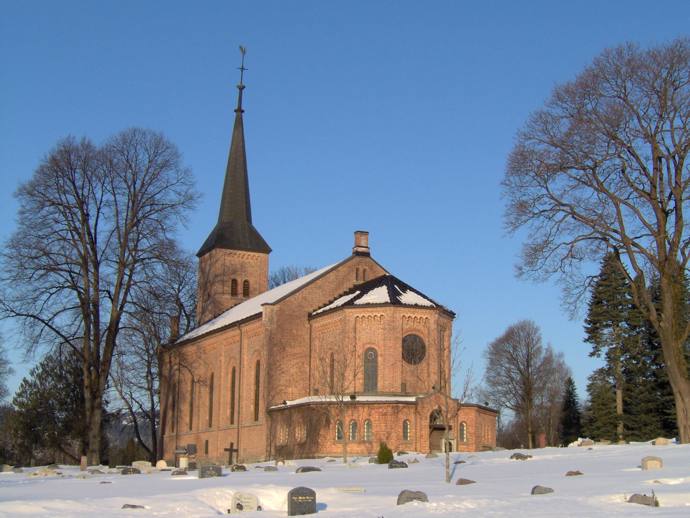 Bryn church in Bærum, Norway